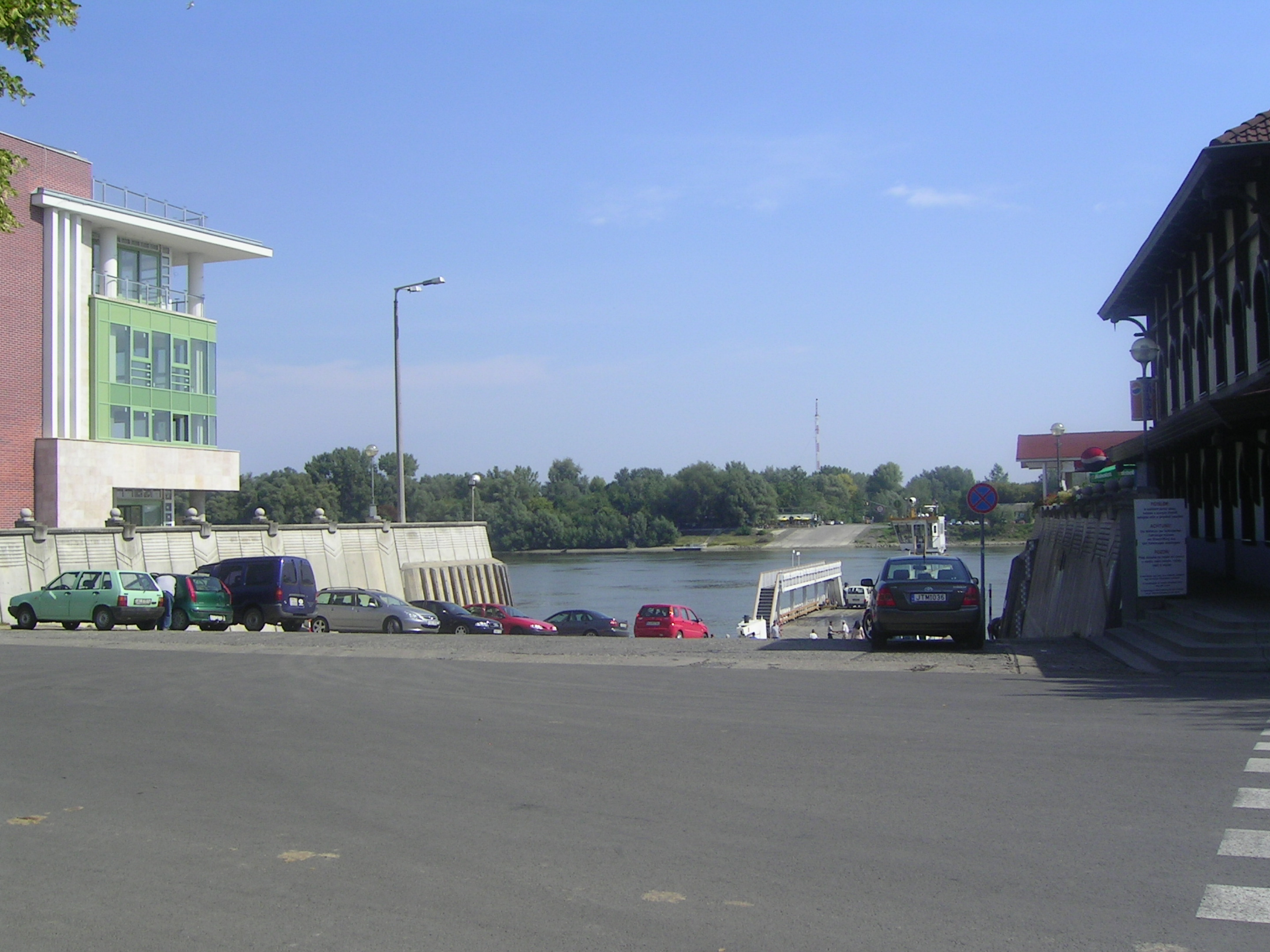 A mohácsi rév